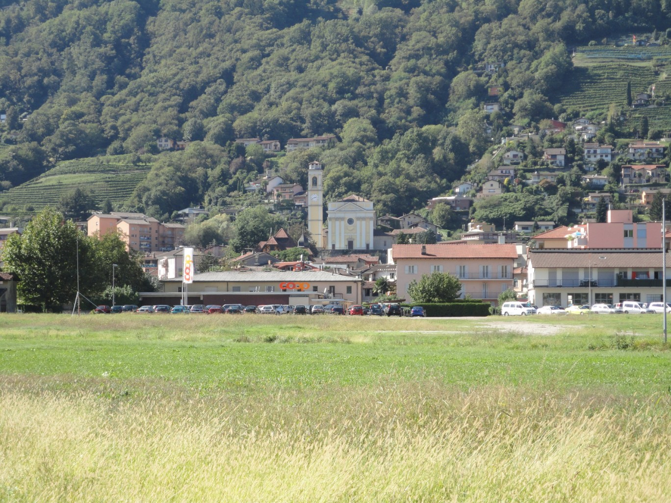 Vista di Agno dal Vedeggio